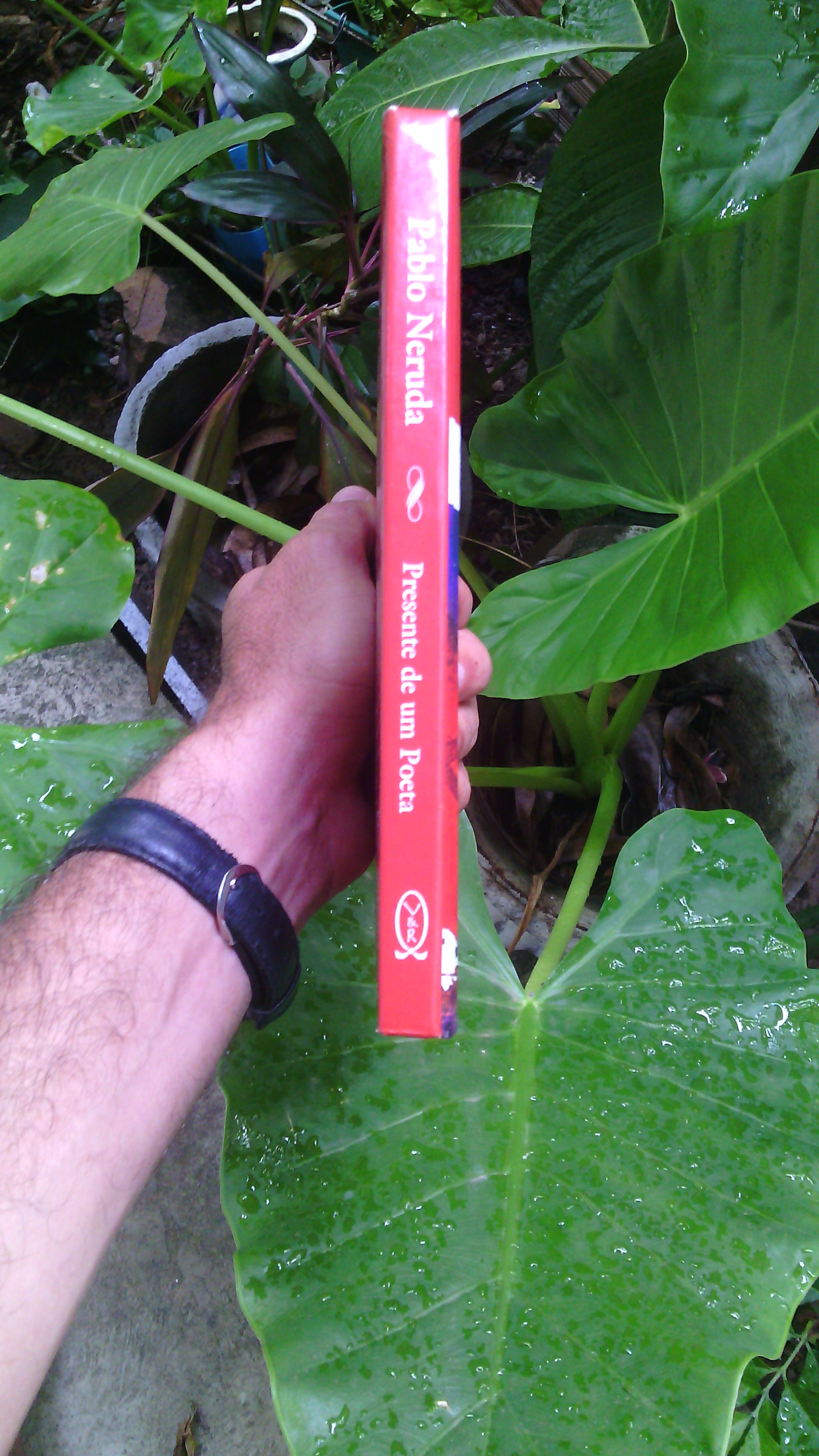 Um livro de Pablo Neruda: Presente de um Poeta, em Português, tradução de Thiago de Melo.